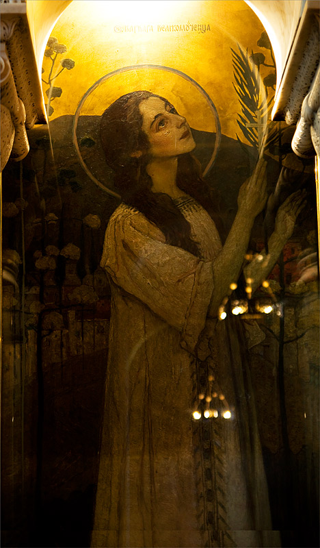 М. Нестеров. Святая Варвара. Владимирский собор (Киев)